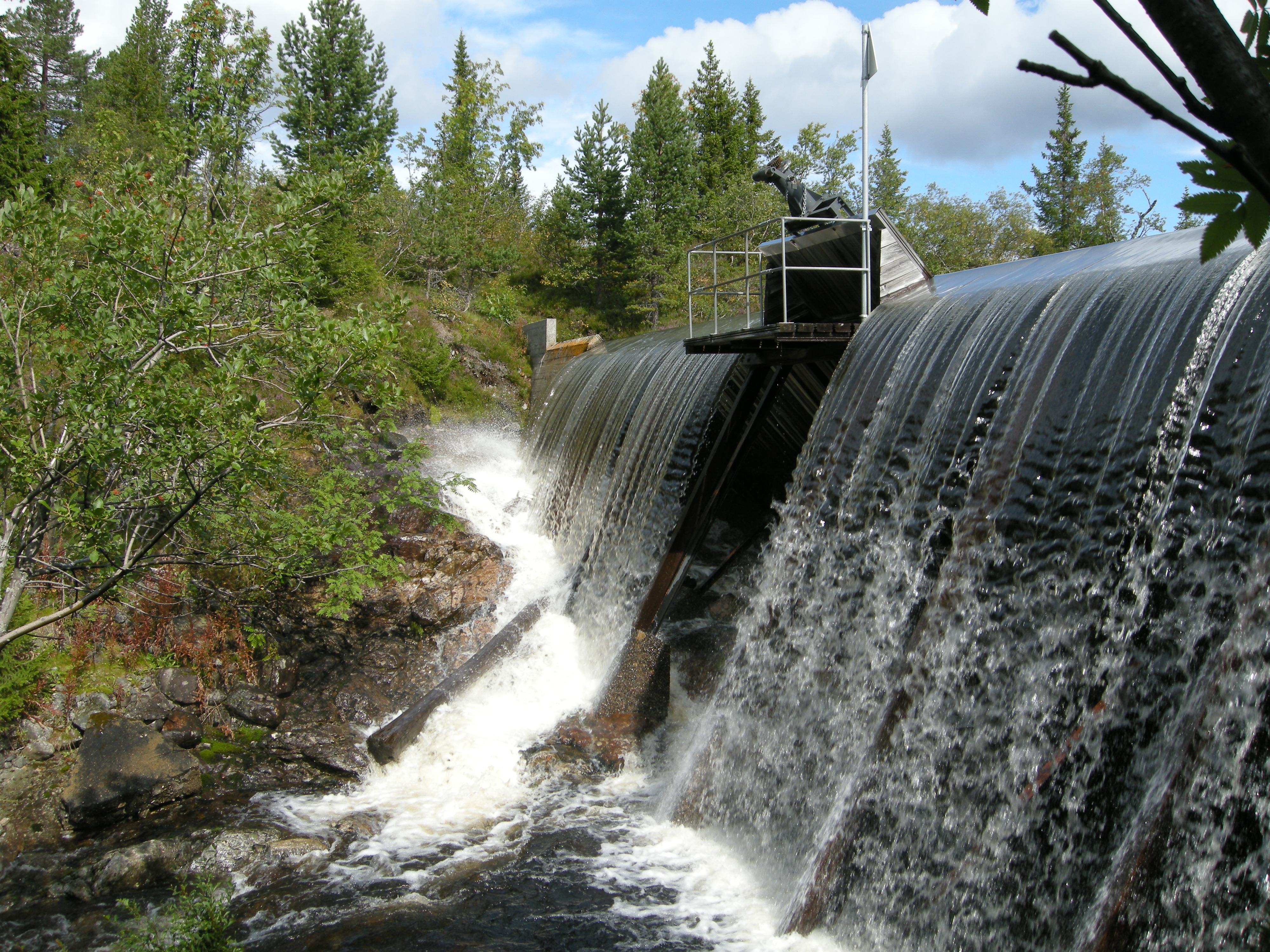 Demningen som regulerer Fiskeløysen på Blefjell i Rollag kommune.